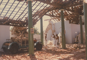 மிகமோசமாக சேதமாக்கப்பட்ட வல்வை வைத்தீஸ்வரன் ஆலயம்